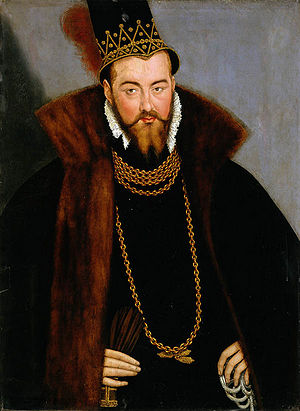 Markgraf Georg Friedrich (reg. 1557-1603) um 1565